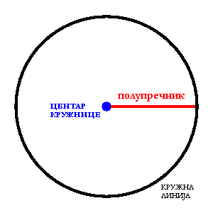 Circle radius